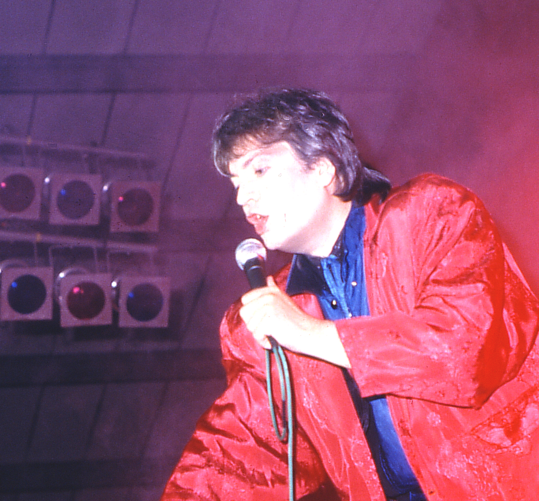 Fancy (Manfred Alois Segieth) live.